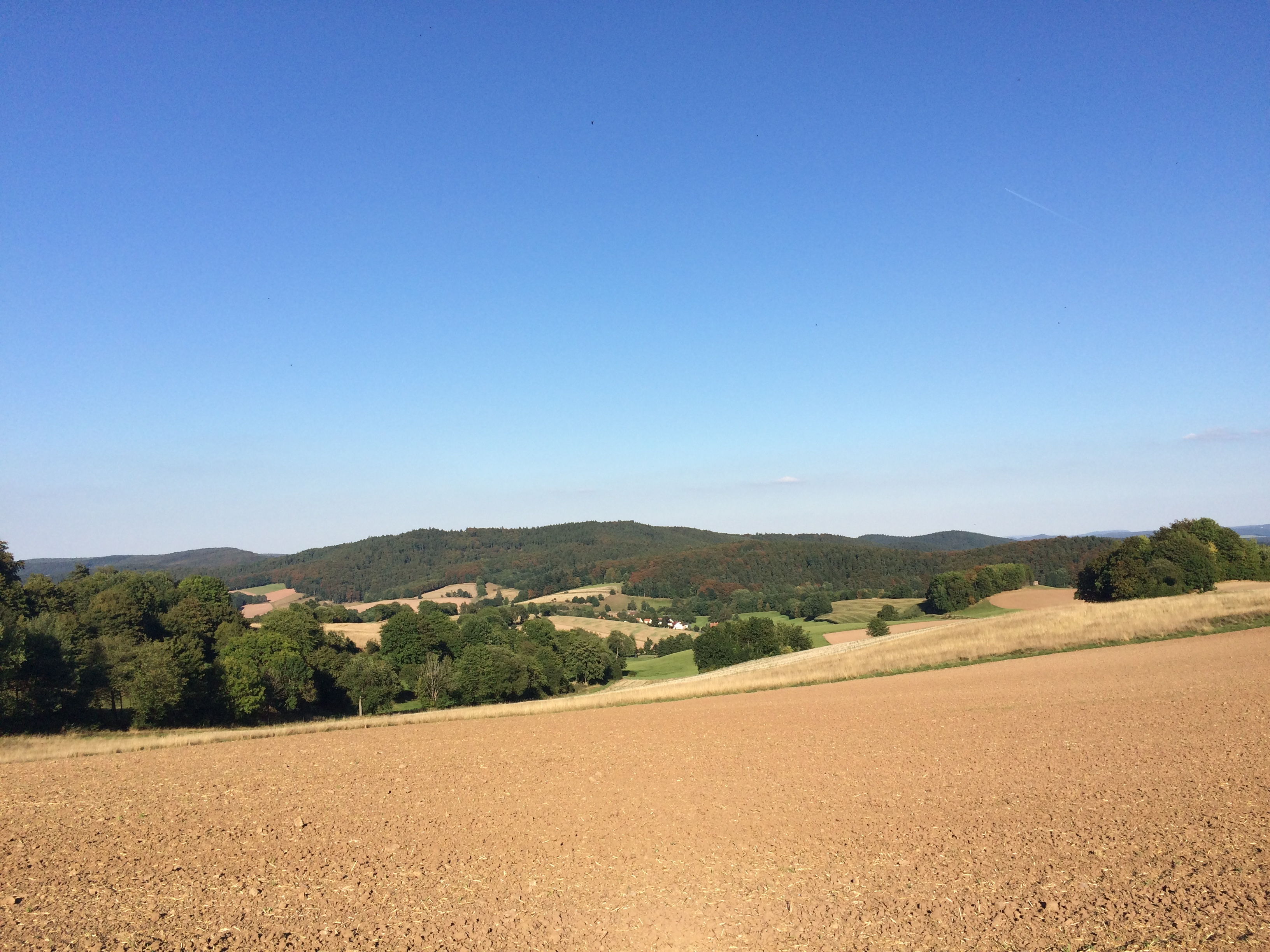 Blick vom Werra-Burgen-Steig Hessen (X5H) nach Blankenbach im Tal der Blanke, Gemarkung Sontra